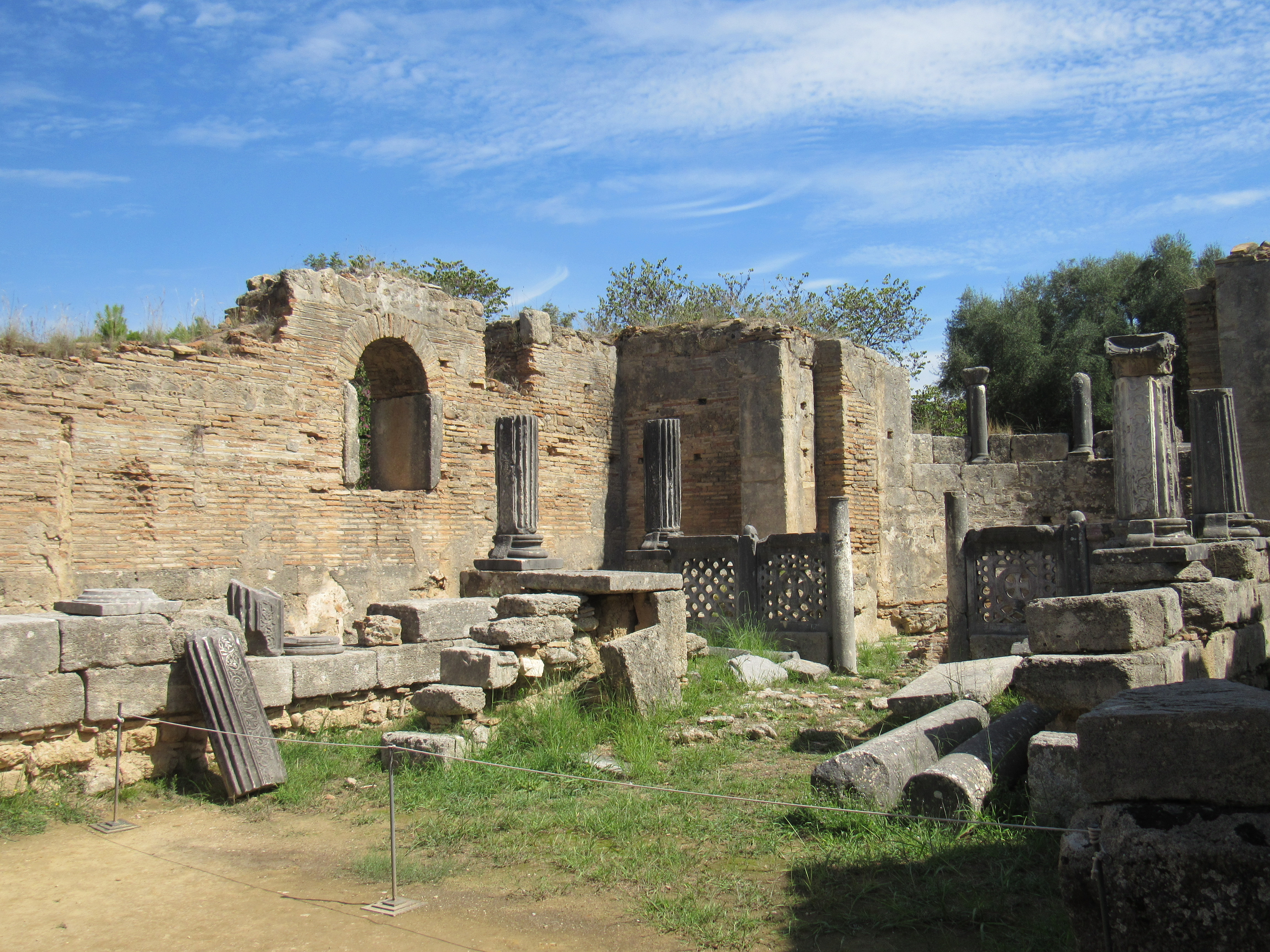 Εργαστήριο του Φειδία«Εργαστήριο του Φειδία»